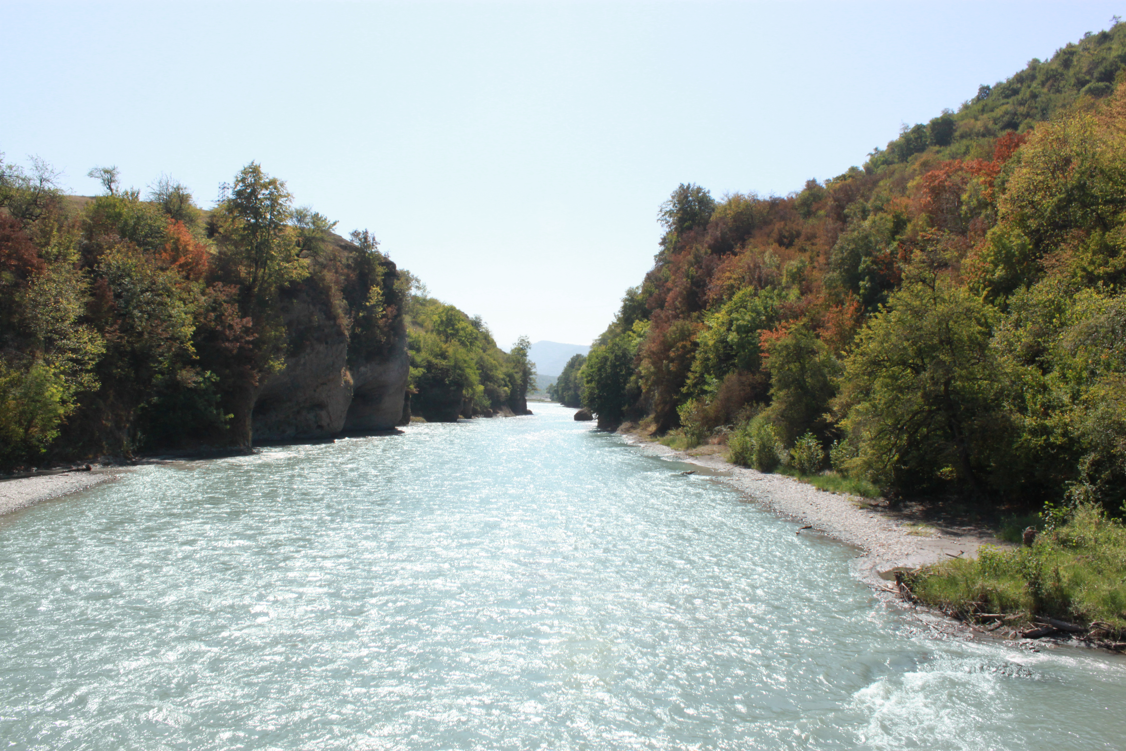 Река Аргун Чечня